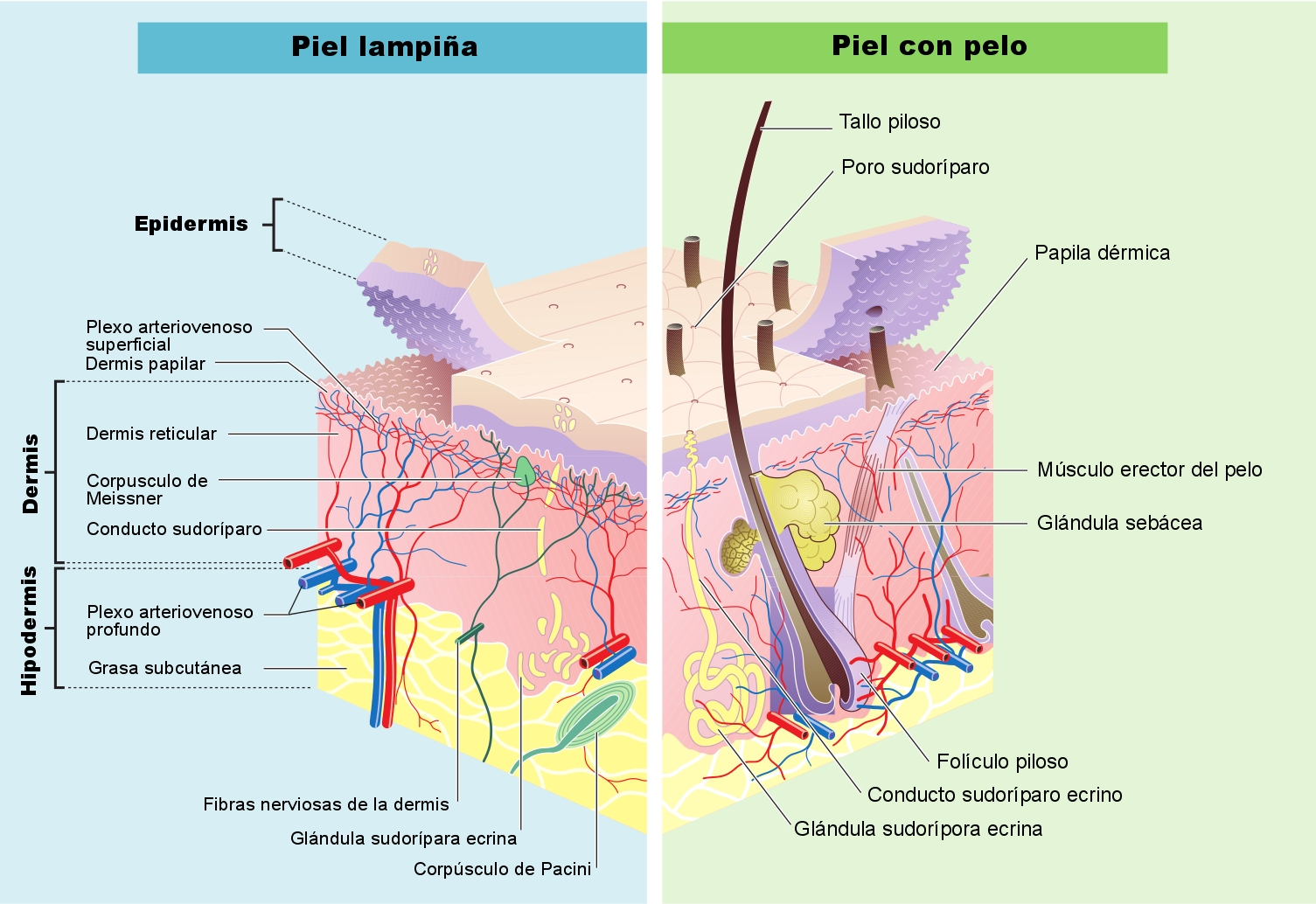 Esquema en el que se representa una visión detallada de la piel humana lampiña y con pelo.